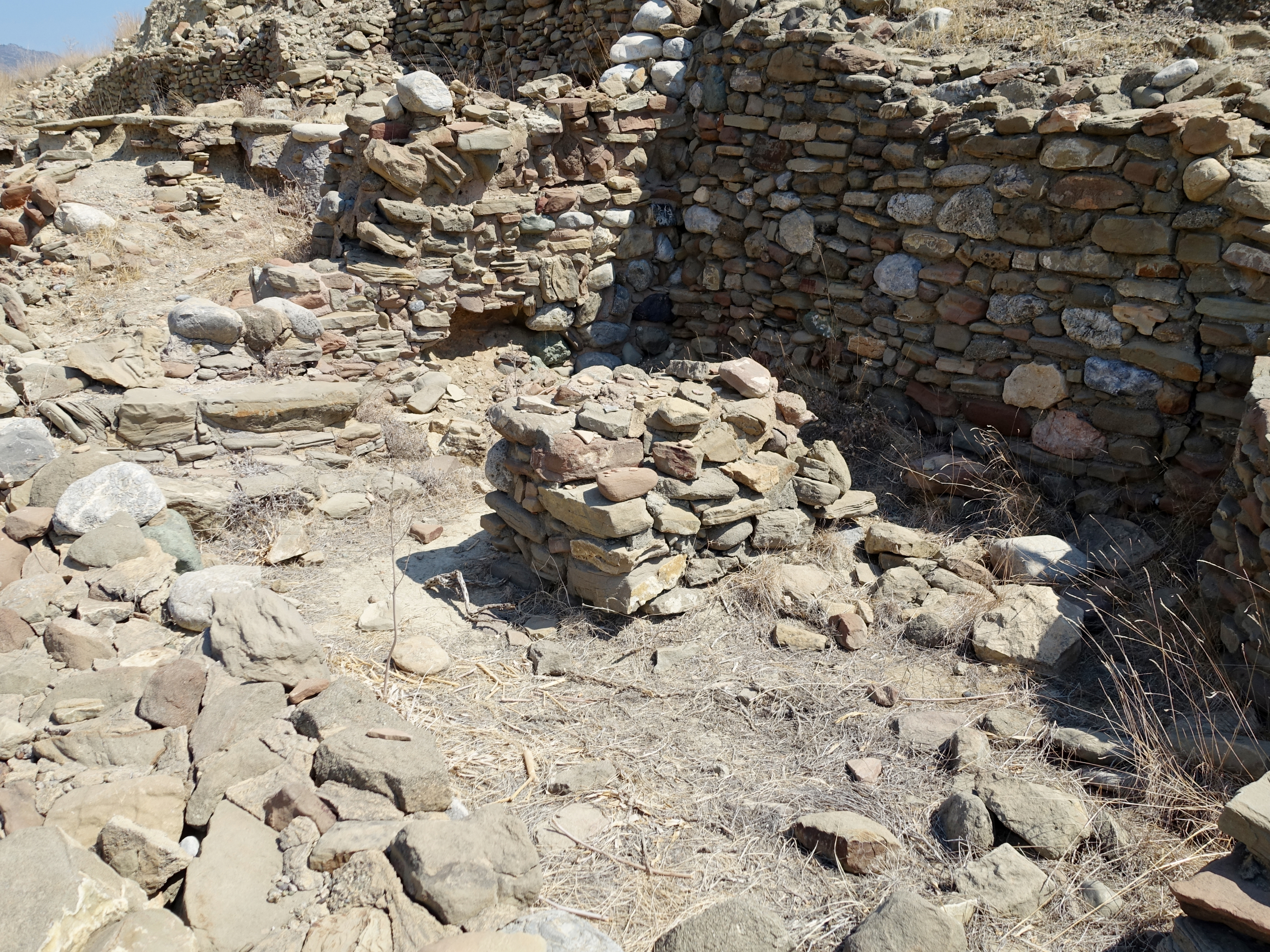 Ausgrabungsstätte von Pyrgos bei Myrtos, Kreta, Griechenland